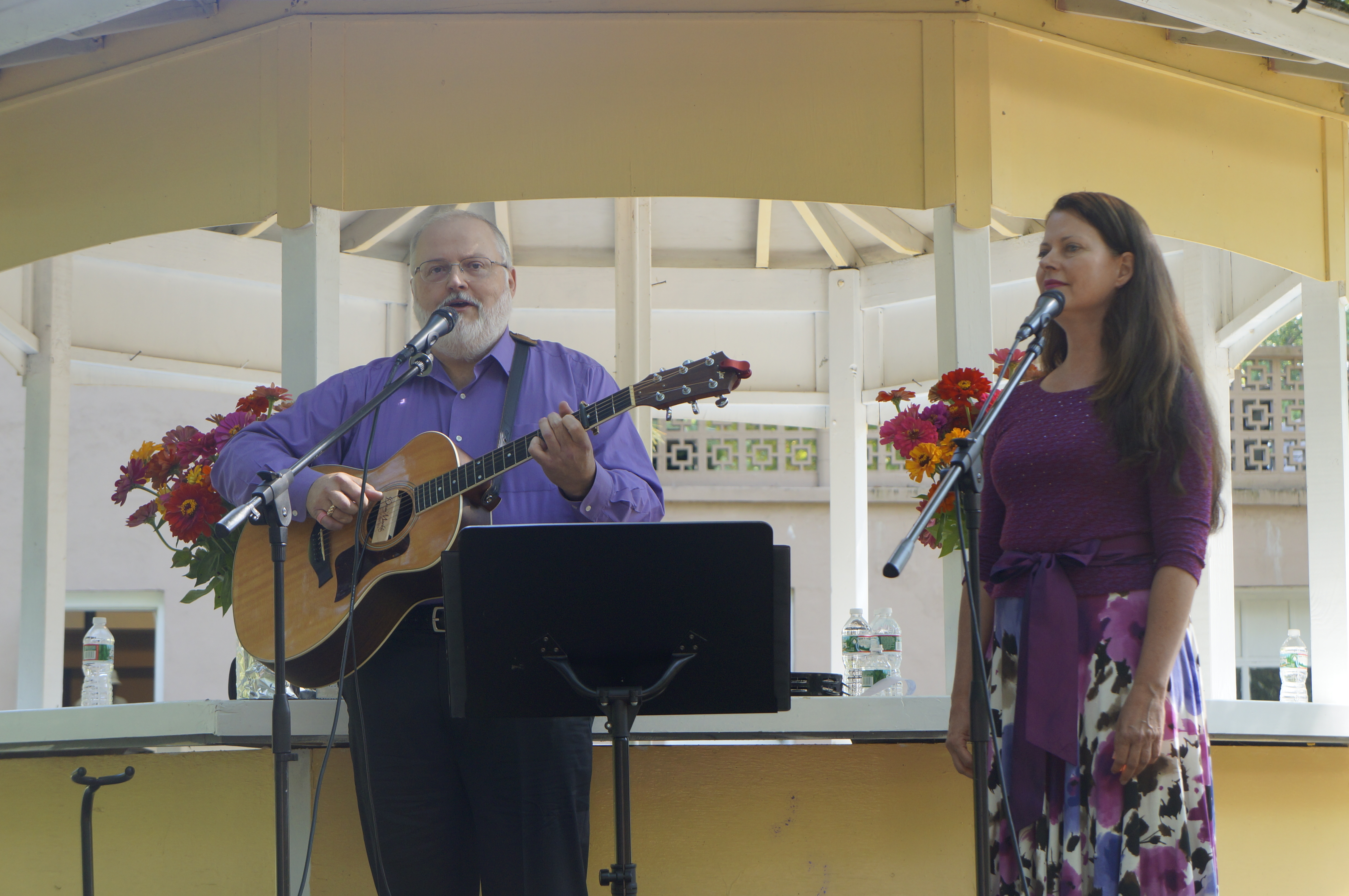 2015.gada 30.augusts. Ņūdžersijas Latviešu biedrība. Foto: Lelde Rāfelde, Saeimas kanceleja Izmantošanas noteikumi: saeima.lv/lv/autortiesibas